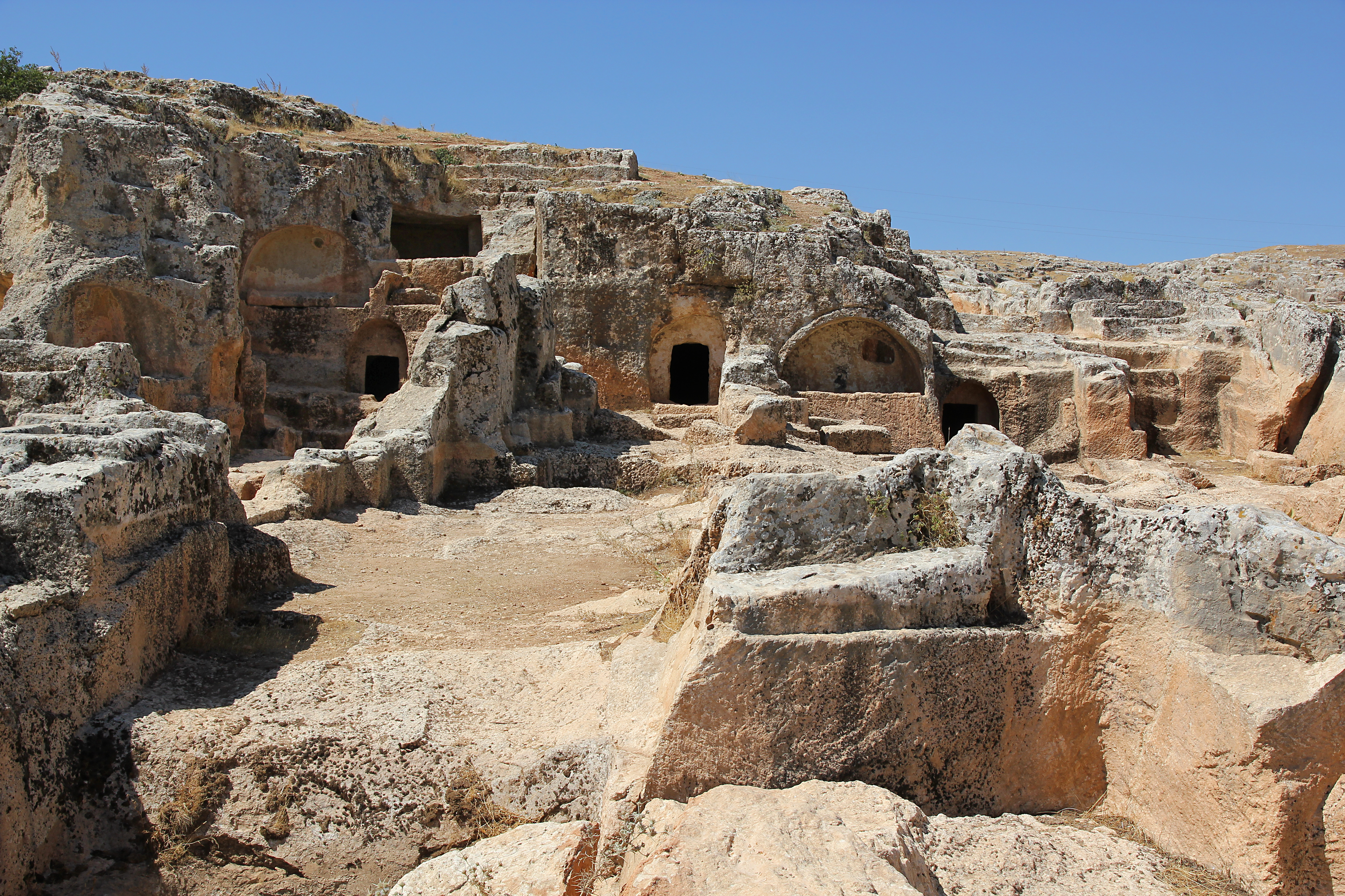 Perrhe, kommagenische Stadt bei Adıyaman, Südtürkei, Nekropole